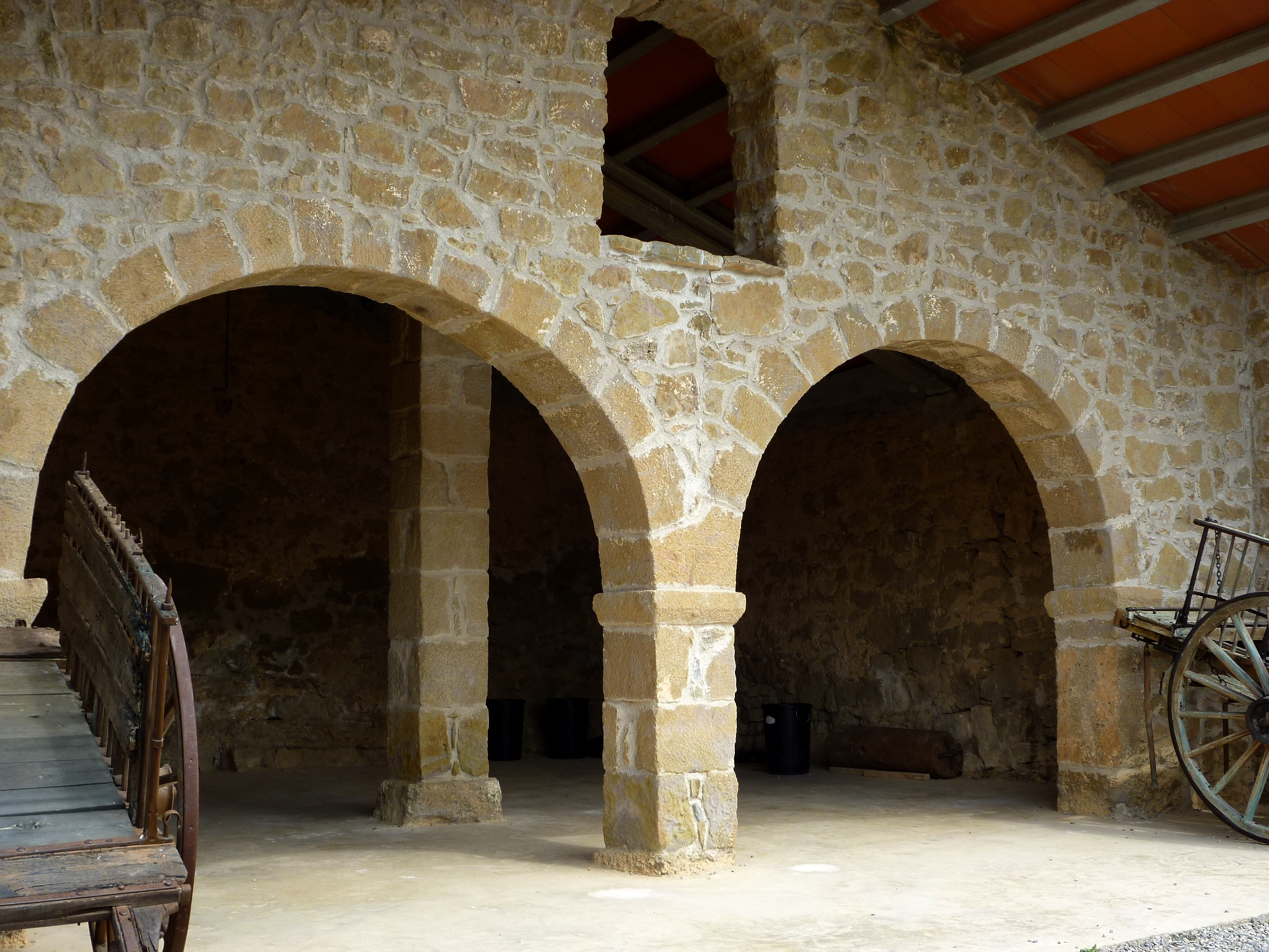 Mas d'en Bosc (la Baronia de Rialb): la pallera